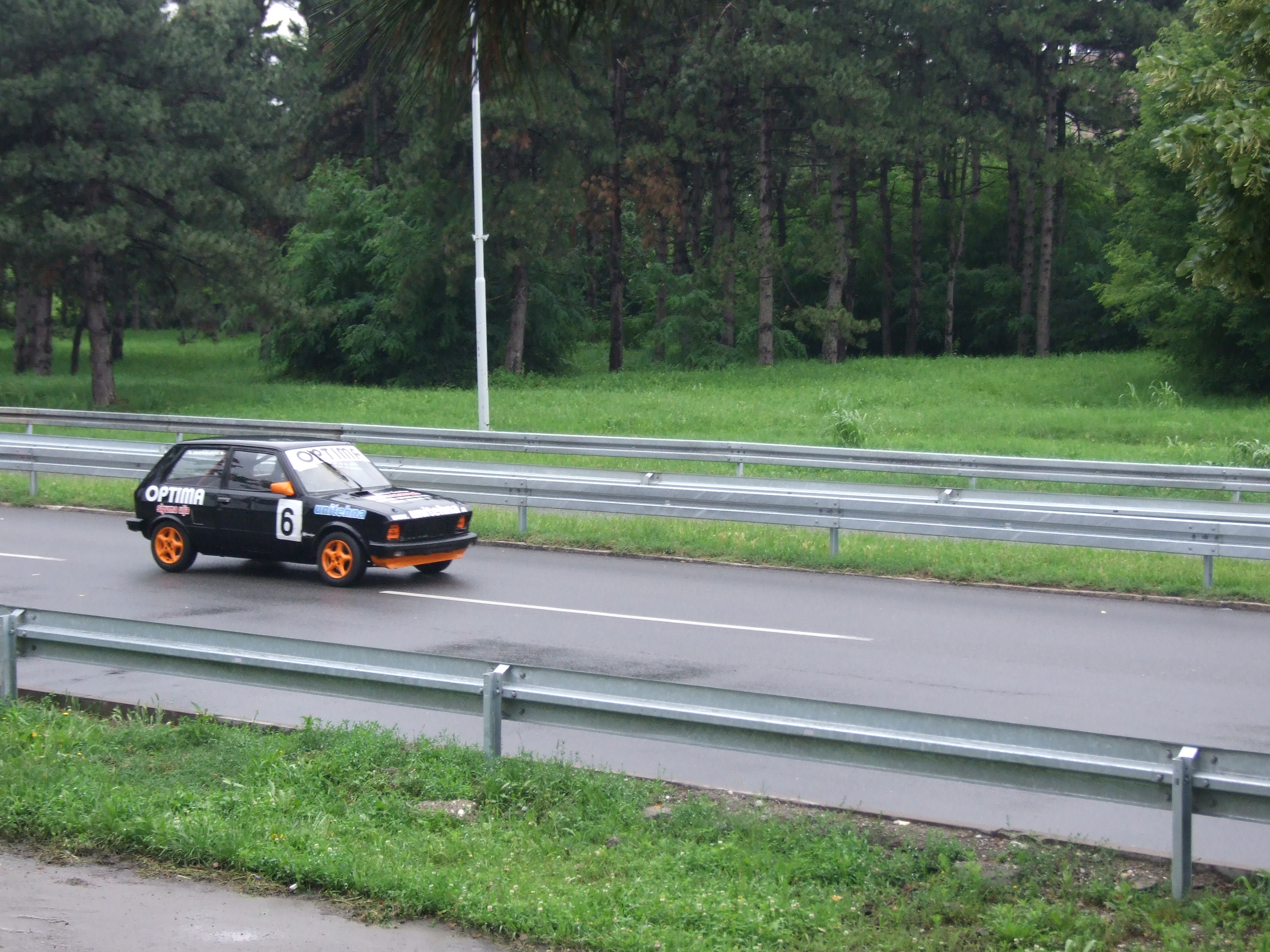 Трећа трка шампионата Србије у кружним тркама. Победник трке у класи -{II}-, Радослав Вукосављевић (Оптима). Фотографија је намењена чланку -{Belgrade 24h race}-, а направљена је 27. јуна 2010 на Новом Београду.